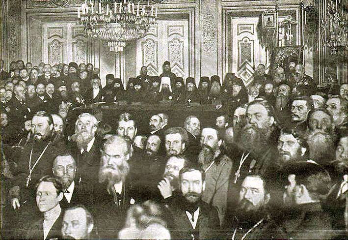 Единоверческий съезд в Санкт-Петербурге 27 января 1912 года